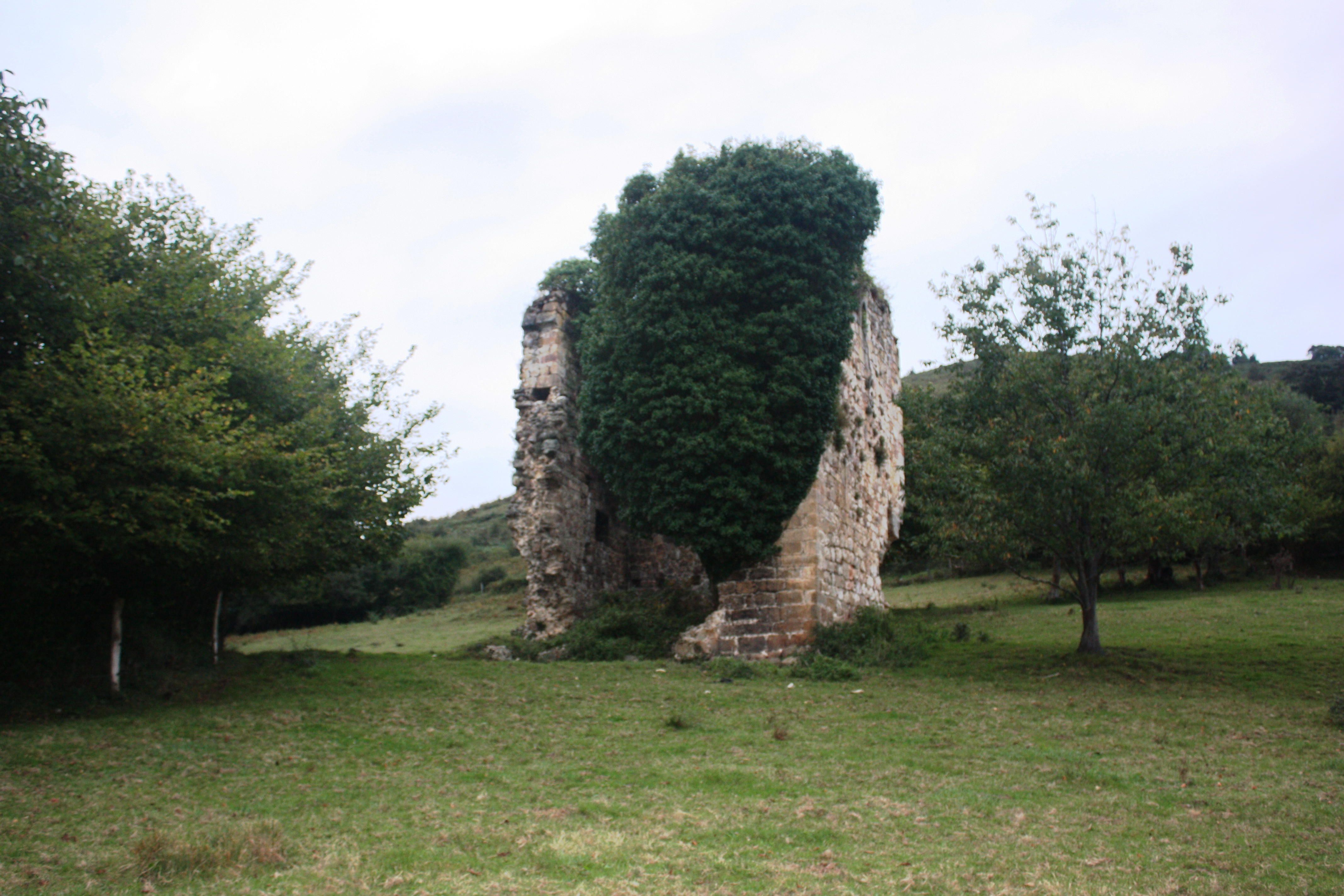 Torreón de Lodeña en Piloña-Asturias